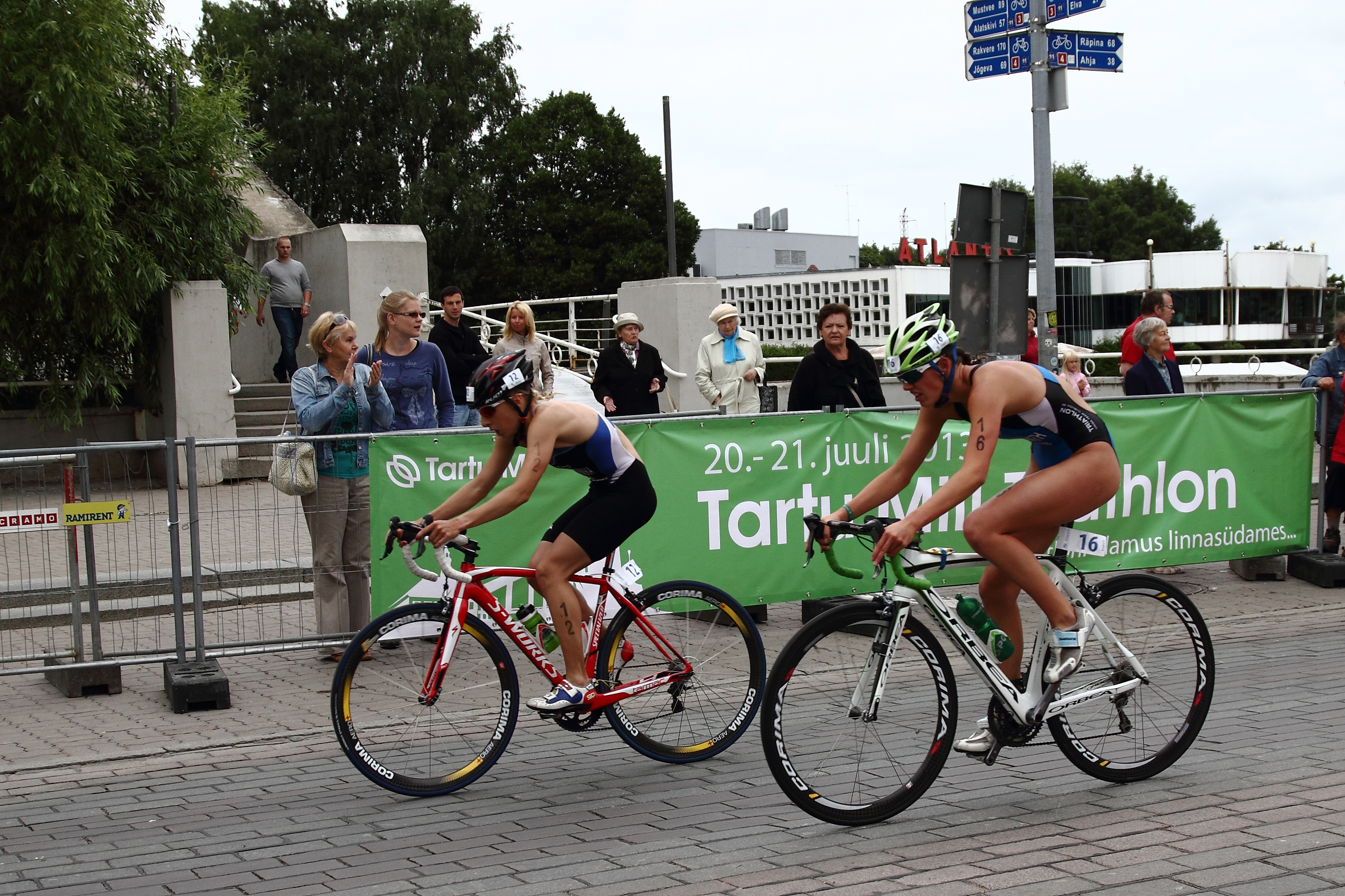 2013.a. Hansapäevad, ratturid Vabaduse puiesteel. Rattaga sõitmas Kerti Kesküla (nr. 12) ja Kadri Akkerman (nr. 16).[1]